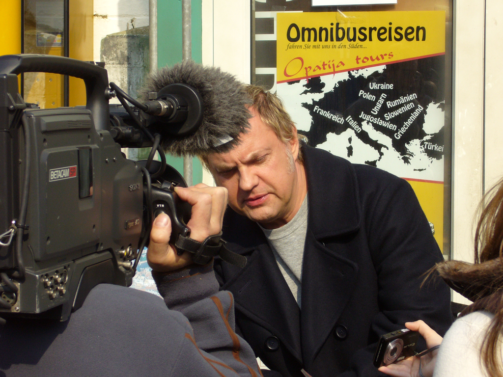 Uwe Ochsenknecht steht Journalisten am Set von ,,IRONMAN" Rede und Antwort.